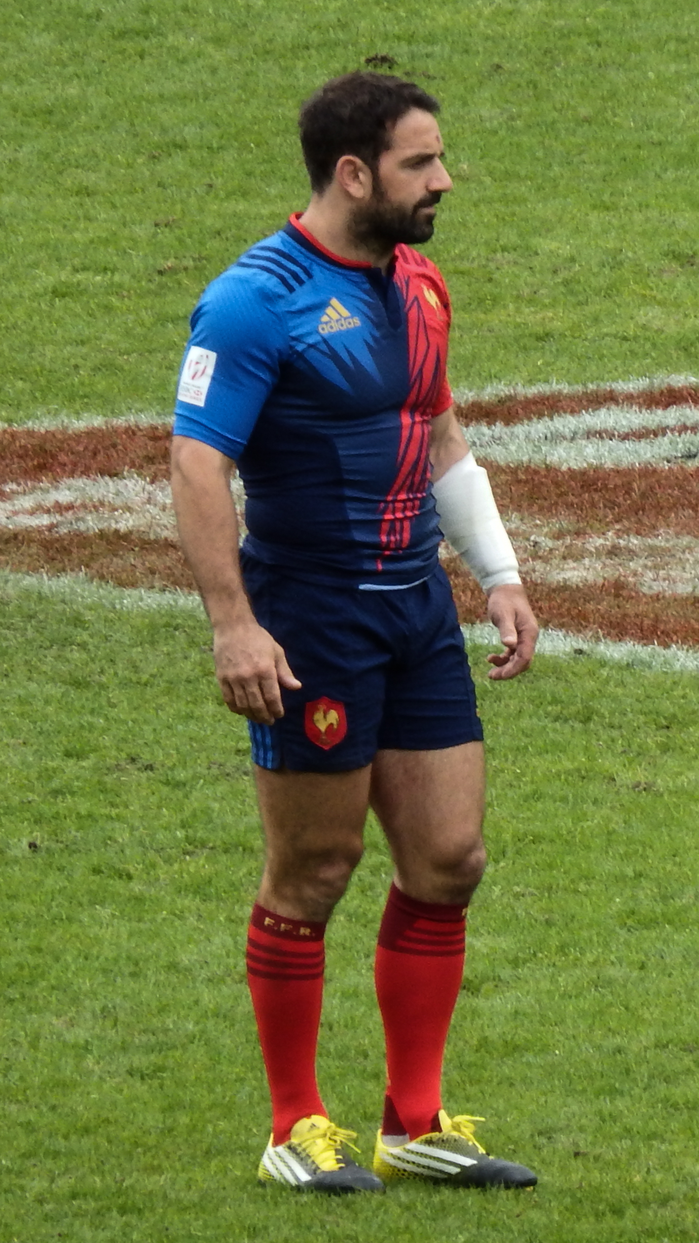 Paris Sevens 2016 — 14 May 2016, stade Jean-Bouin. Match between: Argentina — France